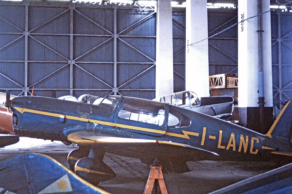 Ambrosini SAI 2S I-LANC at Milano Bresso airport in 1965